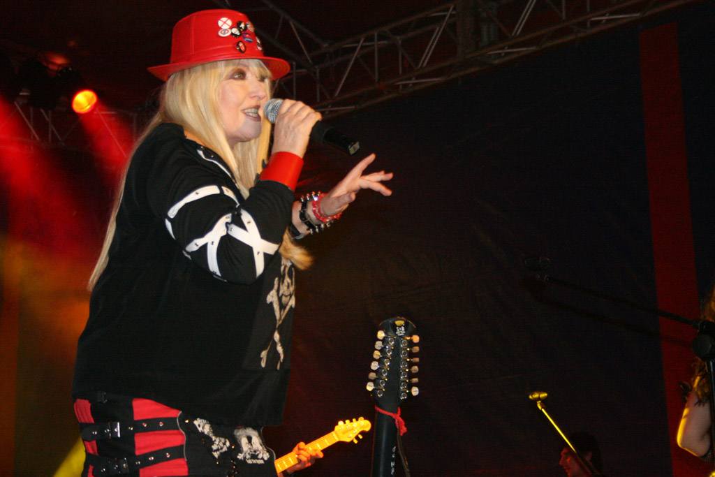 Maryla Rodowicz